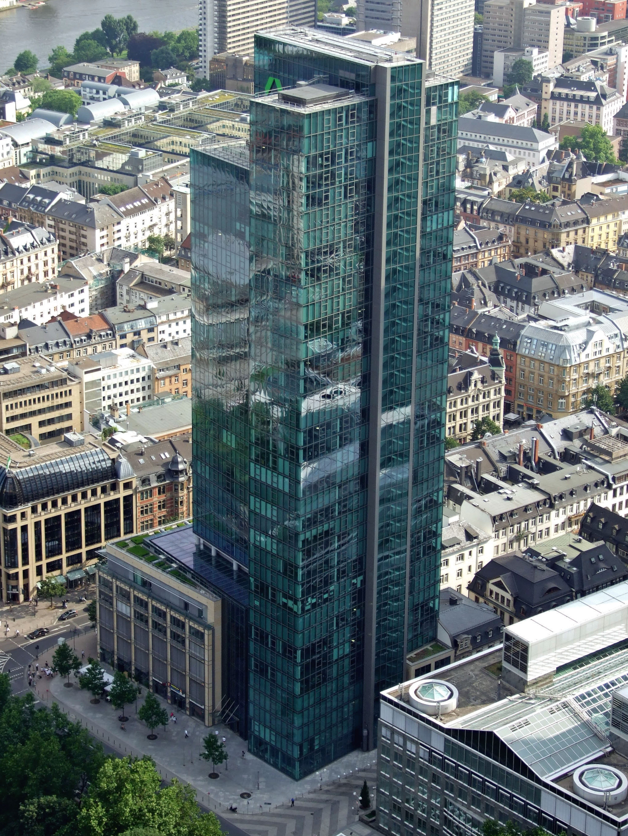 Gallileo (Dresdner Bank und English Theatre) im Bahnhofsviertel Ffm